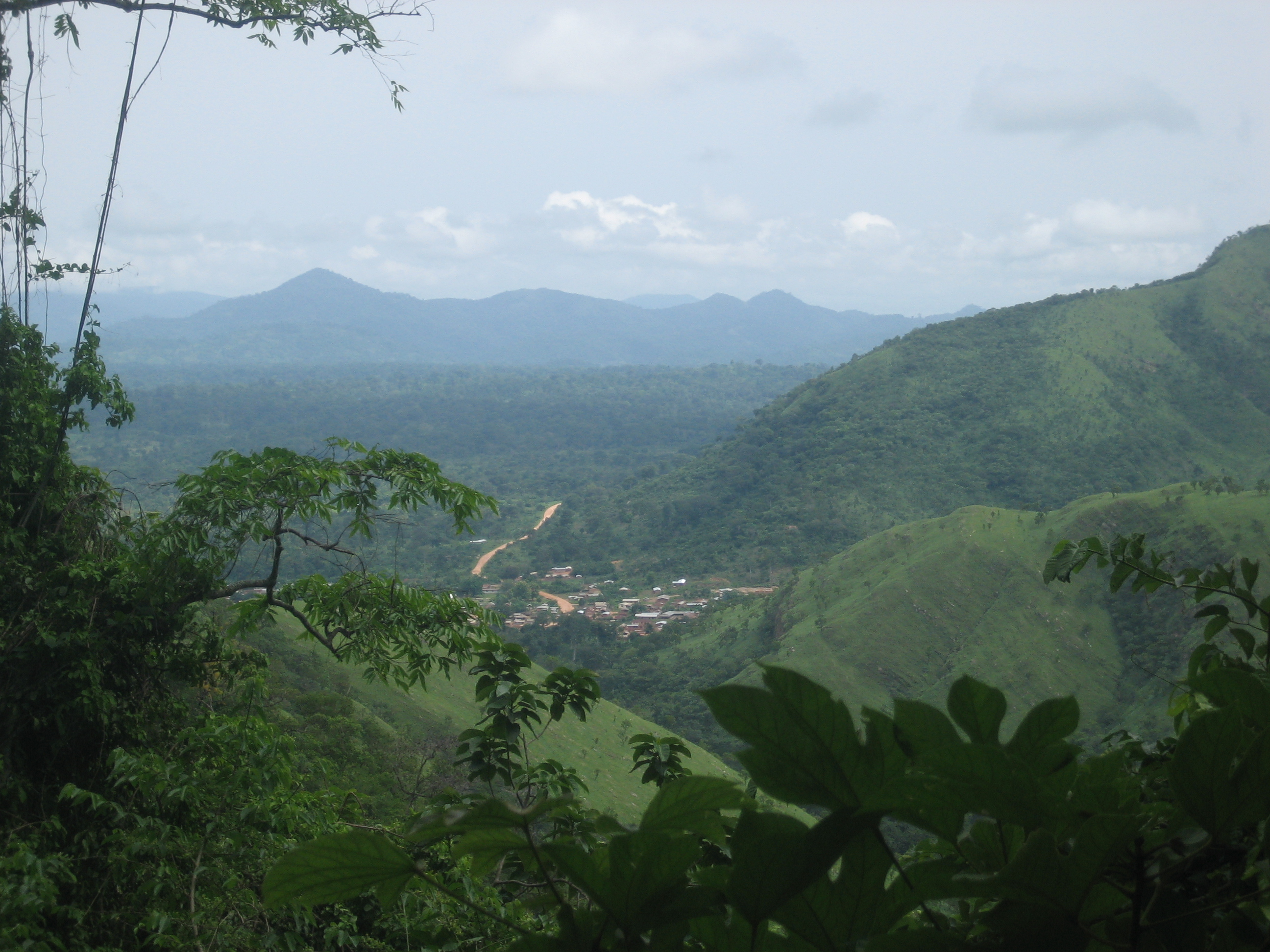 Volta Region in Ghana. Akuapim-Togo-Kette im Grenzgebiet zu Togo.